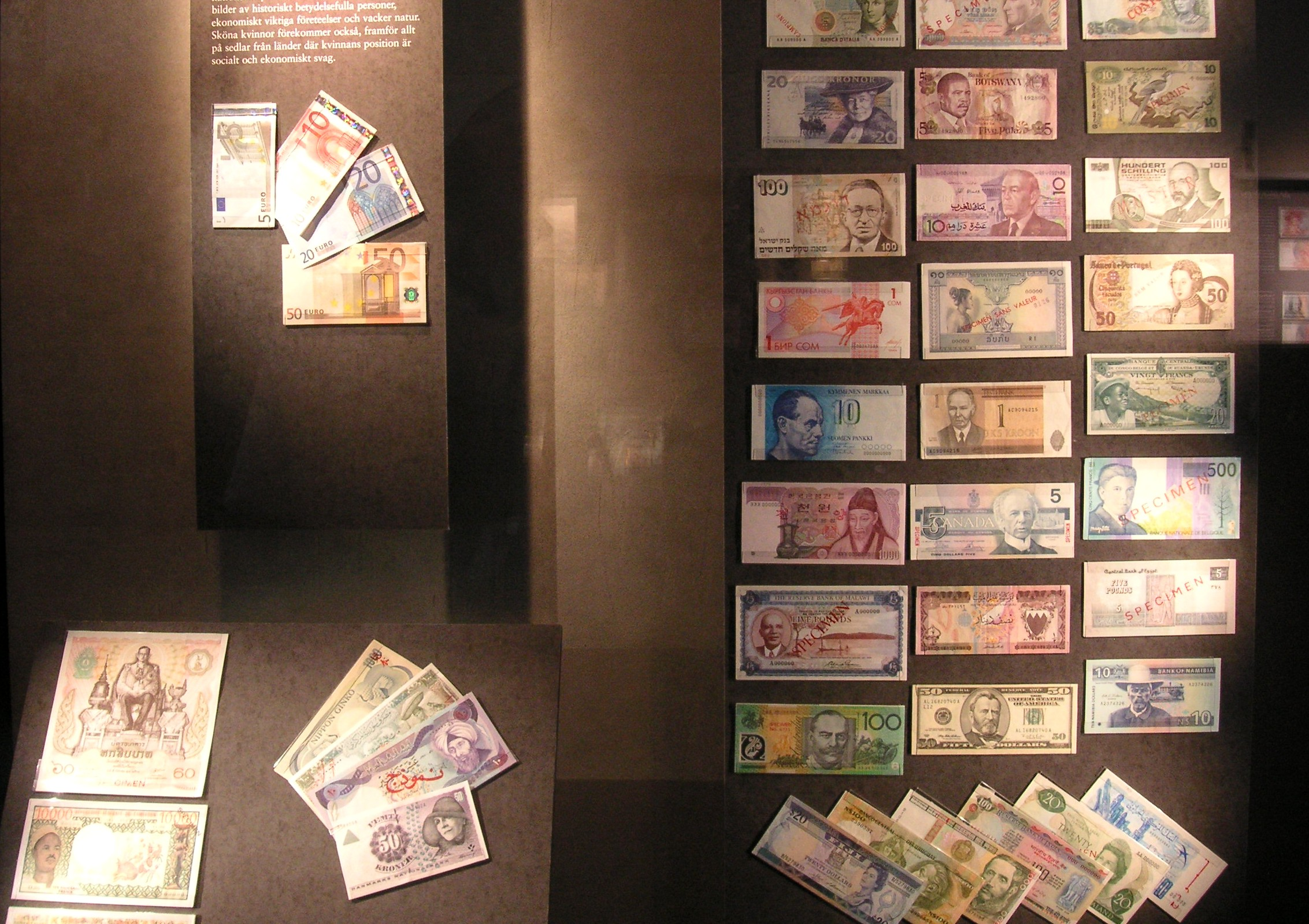 Tumba bruksmuseum interiör